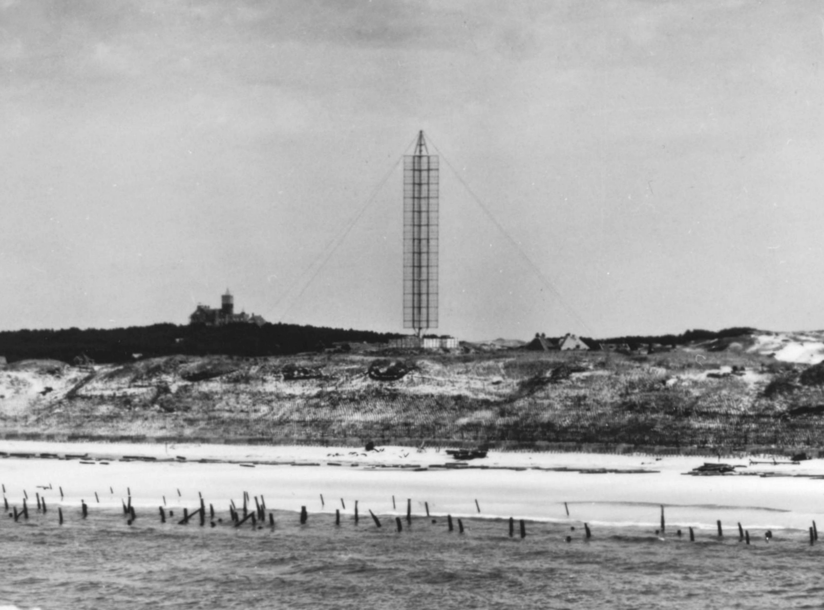 Luchtopname. Wasserman-radarinstallatie bij Bergen aan Zee [gemaakt door een laagvliegende De Havilland Mosquito mk.XVI van 540 Squadron van de RAF]